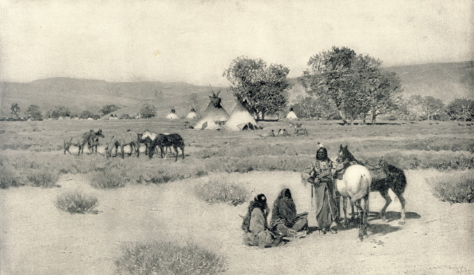 Camp sioux.